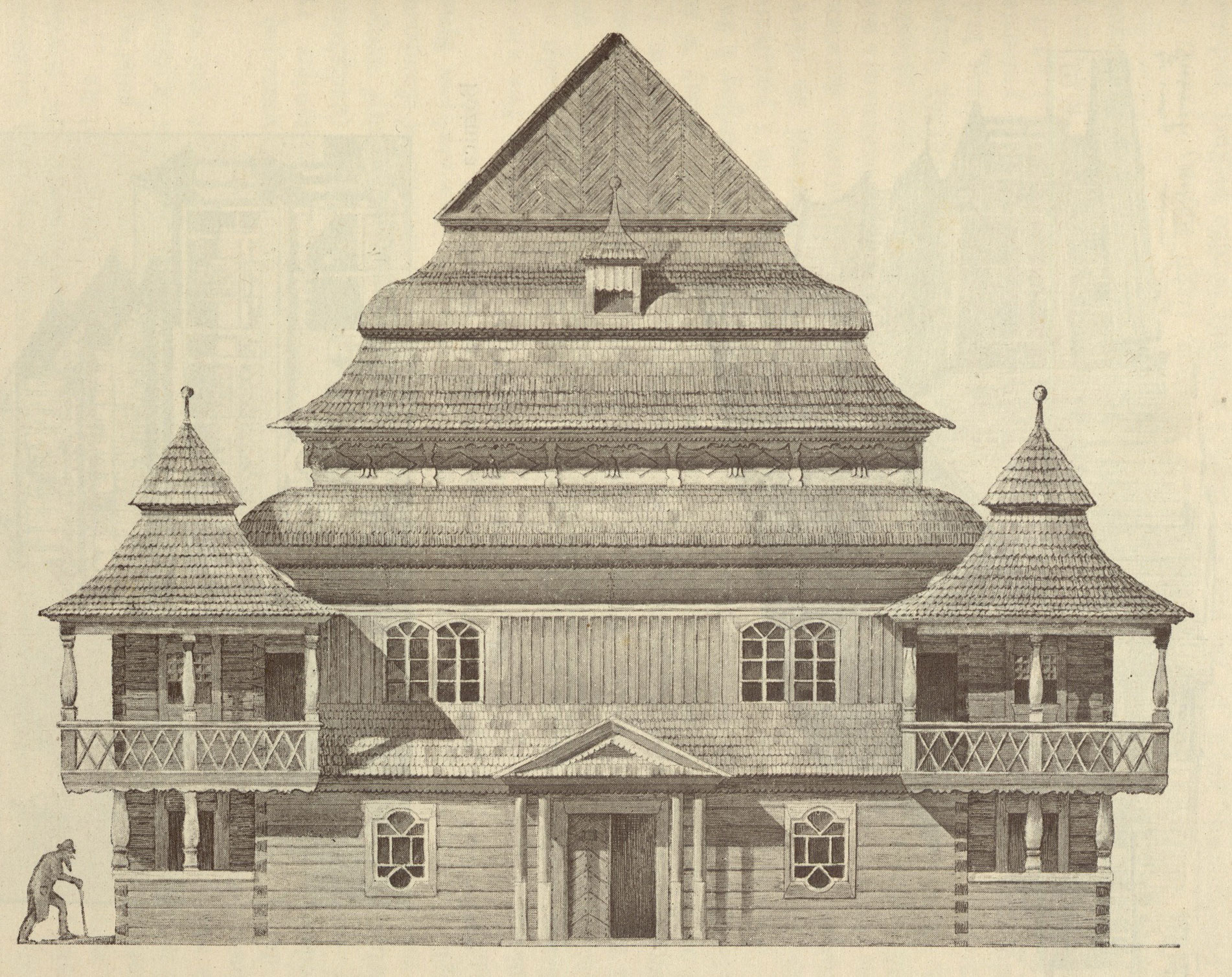 Беларуская (тарашкевіца): Нароўля (Naroŭla). Сынагога